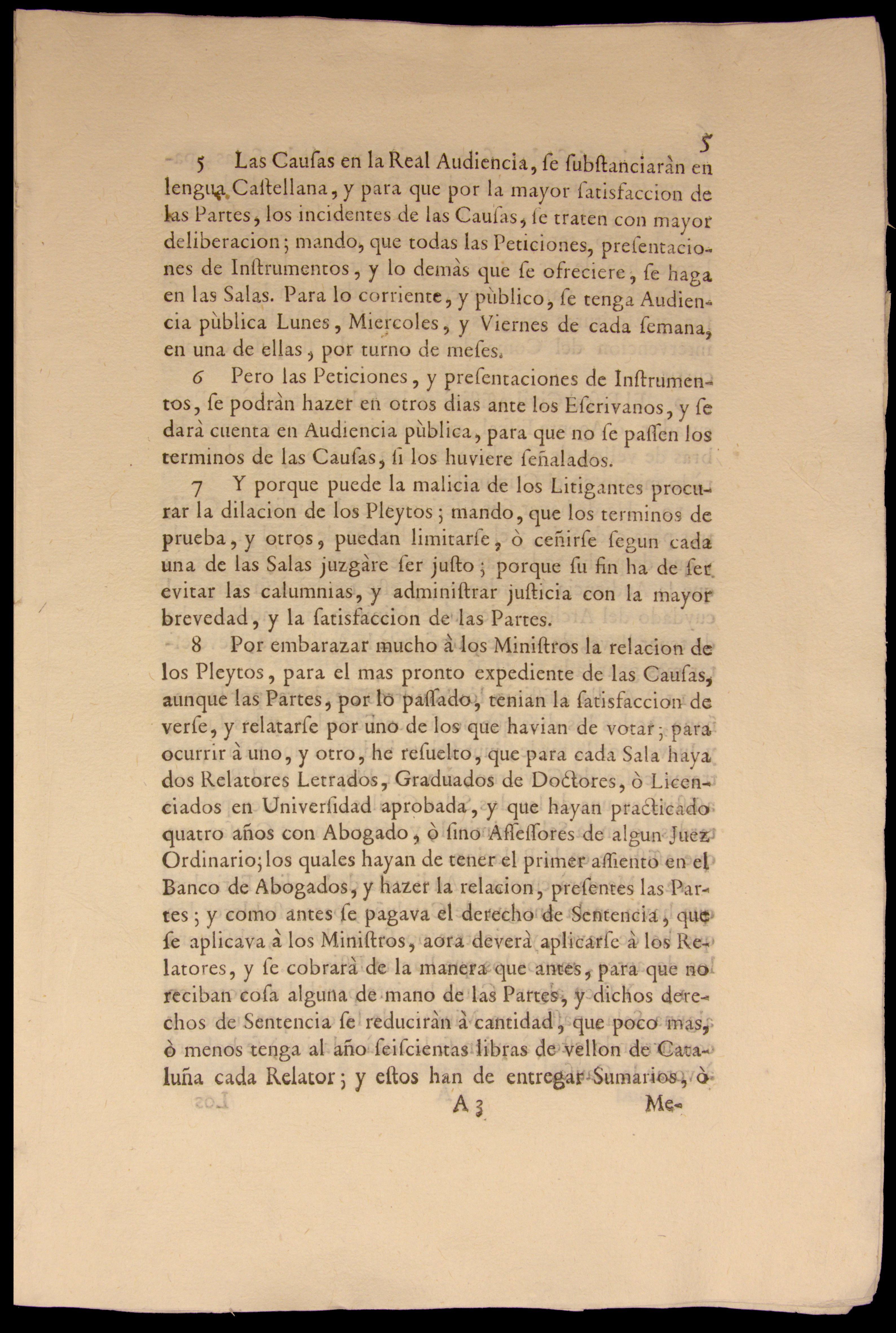 Document de la Nueva planta de la Real Audiencia del Principado de Cataluña. Establerta el 16 de gener de 1716. Aquest exemplar es troba guardat al Museu d'Història de Catalunya. Pàgina 5: articles 5, 6, 7 i 8.